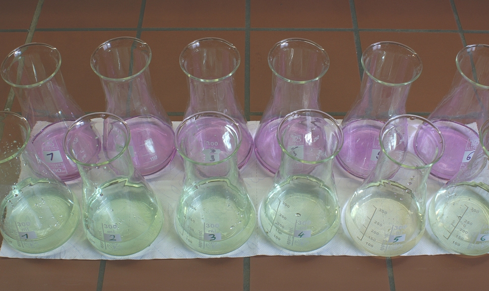 Bestimmung von Ammoniumstickstoff in Gülleproben